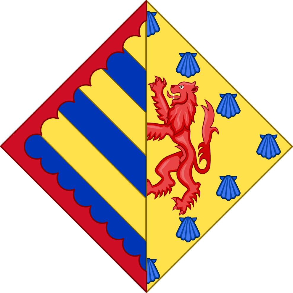 Armes d'Agnès de Dampierre, dame héritière de Bourbon